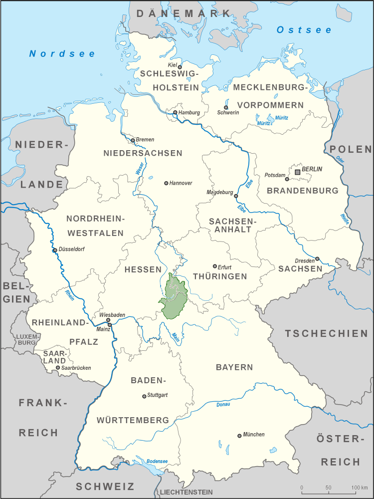 Lage der Rhön (Mittelgebirge) in Deutschland